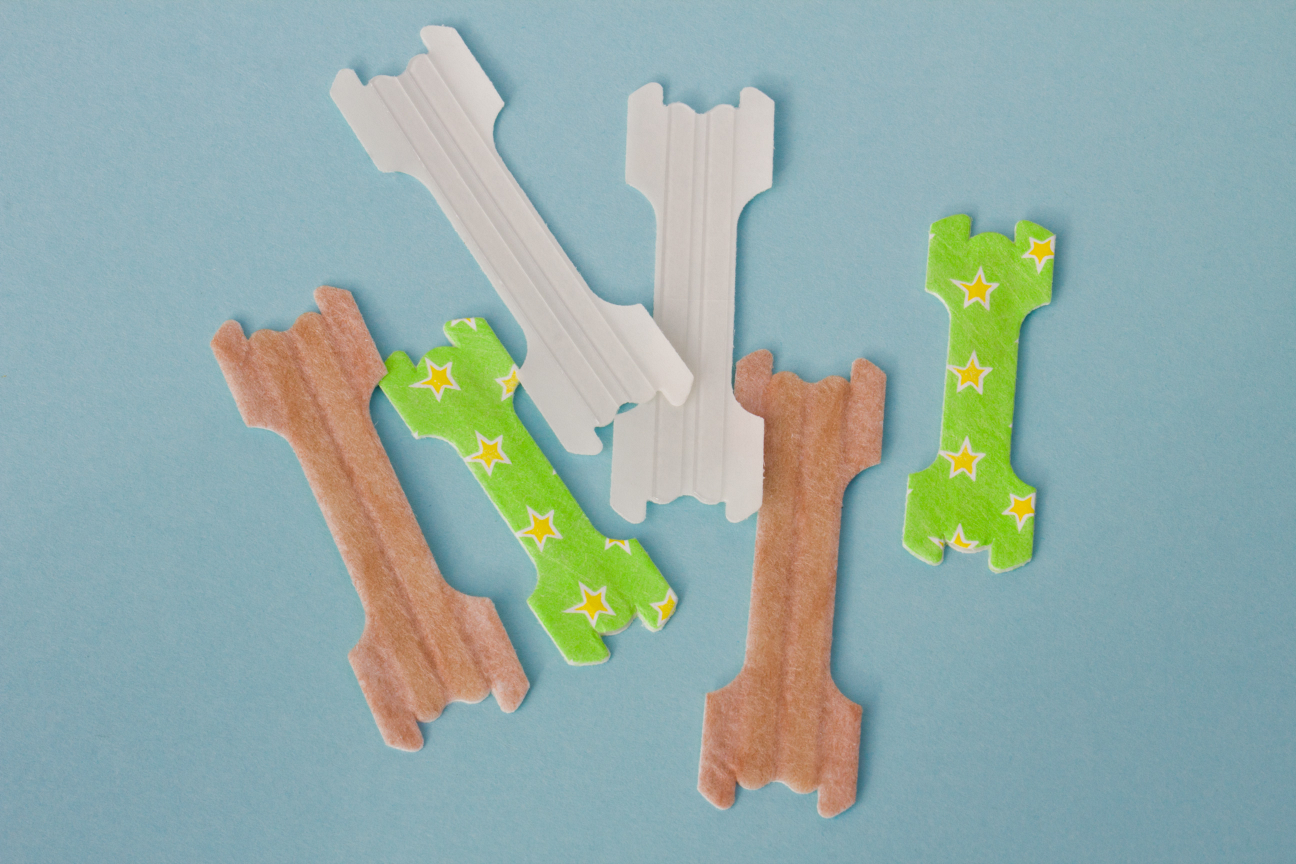 Nasenpflaster/Nasenstrip GlaxoSmithKline "Besser atmen" beige, transparent und Kids